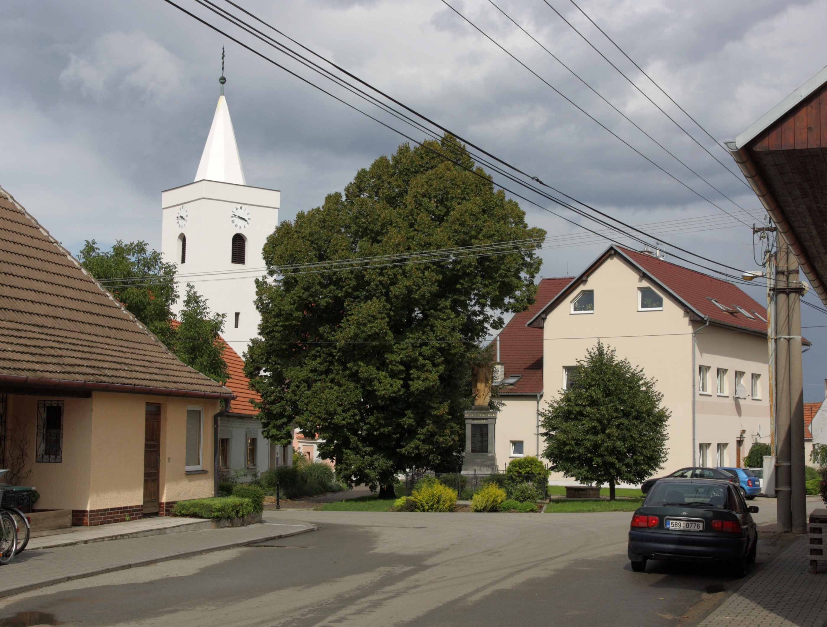 Malešovice - ulice ke kostelu.